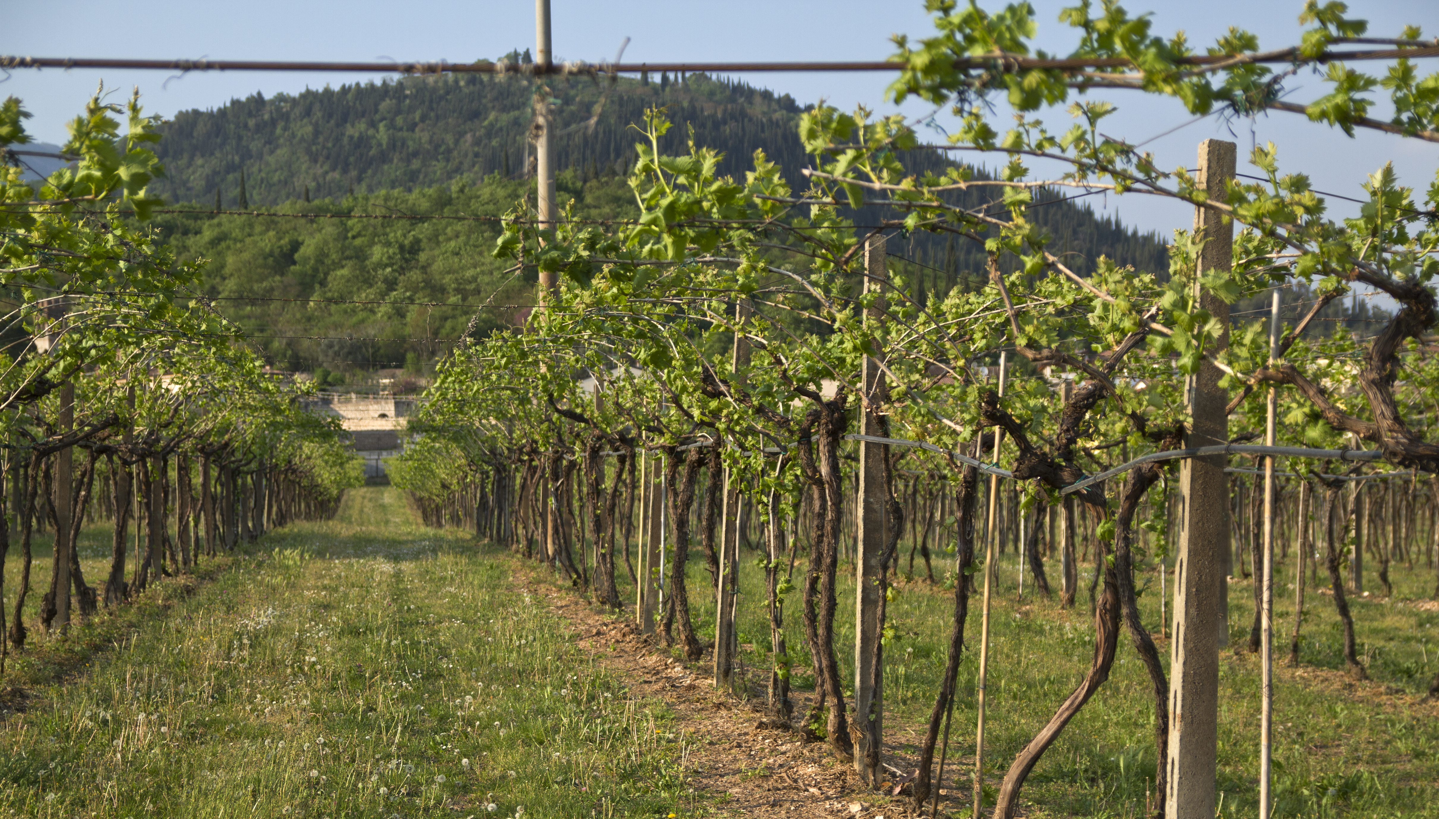 Allegrini vinyard, Fumane, Verona, Veneto, Italy